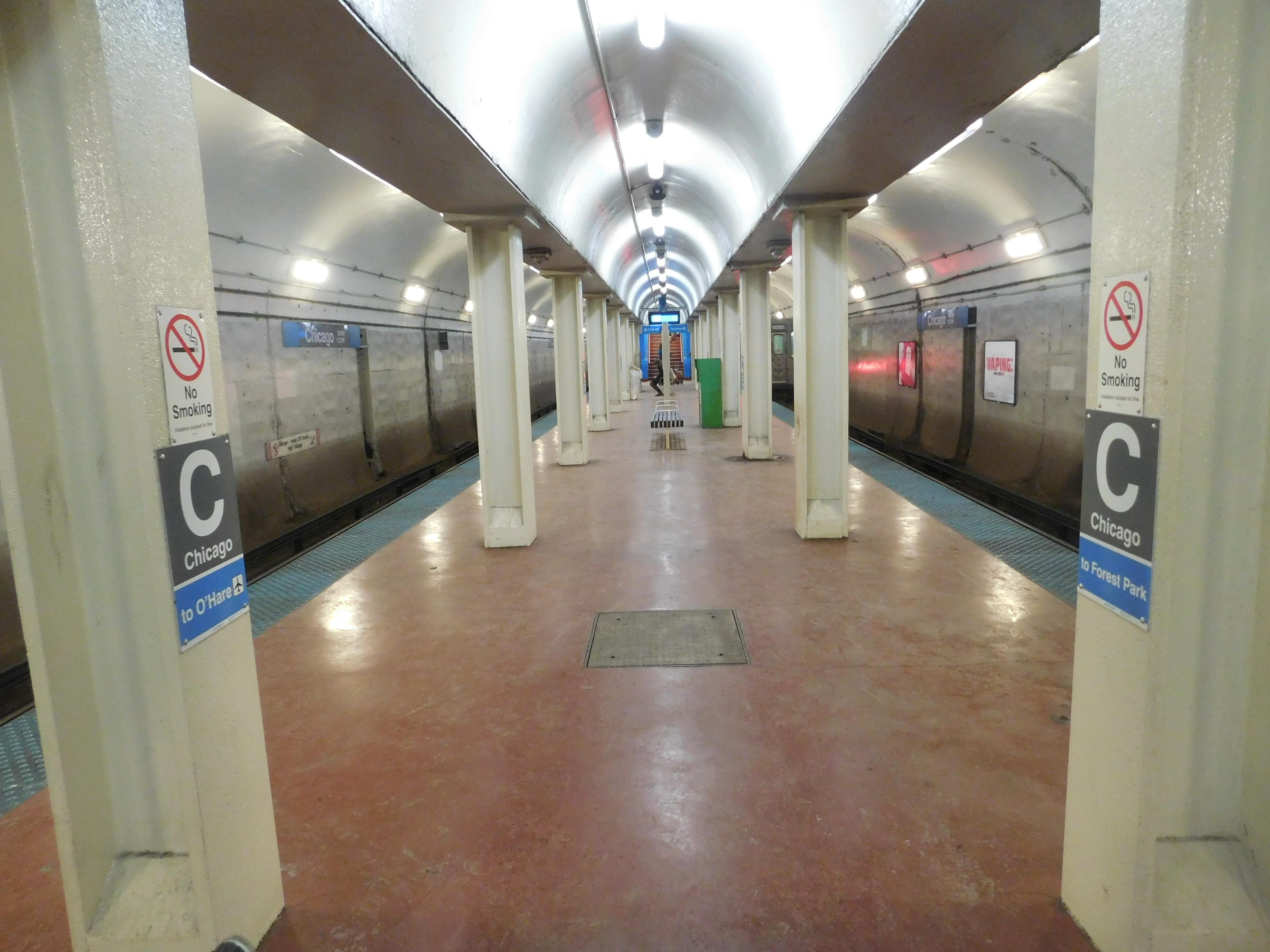 Chicago, Illinois